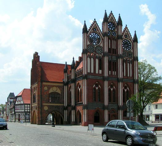 Rathaus von Tangermünde